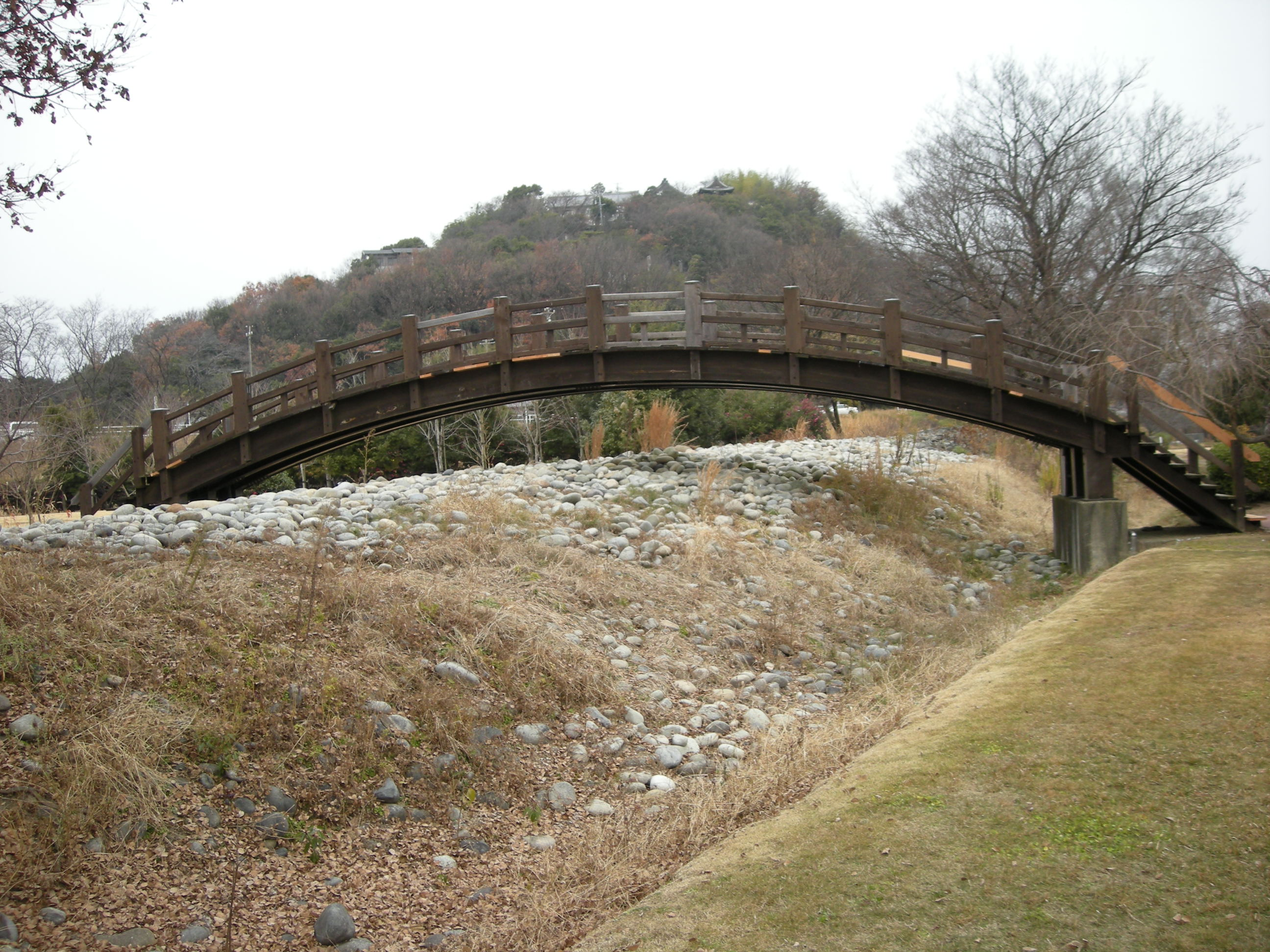 Maedo Saruotsutsumi（前渡猿尾堤）